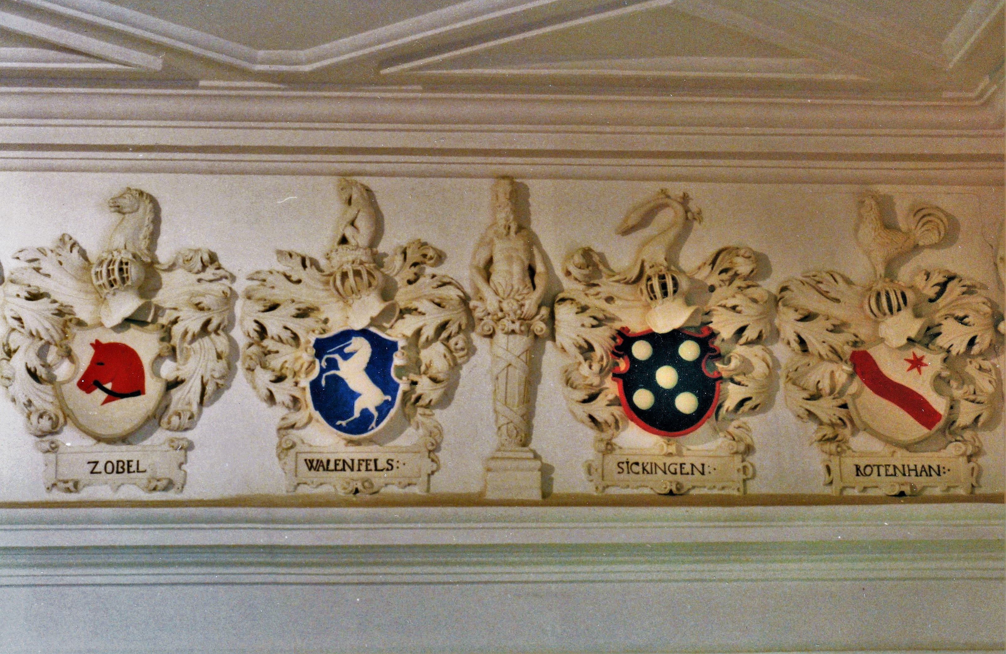 Schloss Grumbach (Rimpar): Wappenfries im Rittersaal (um 1552)